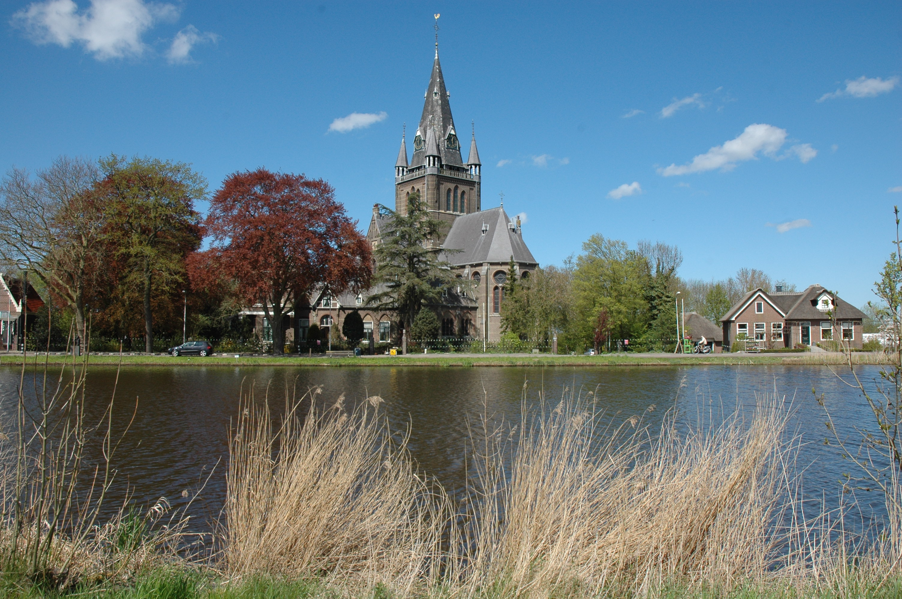 Nes aan de Amstel